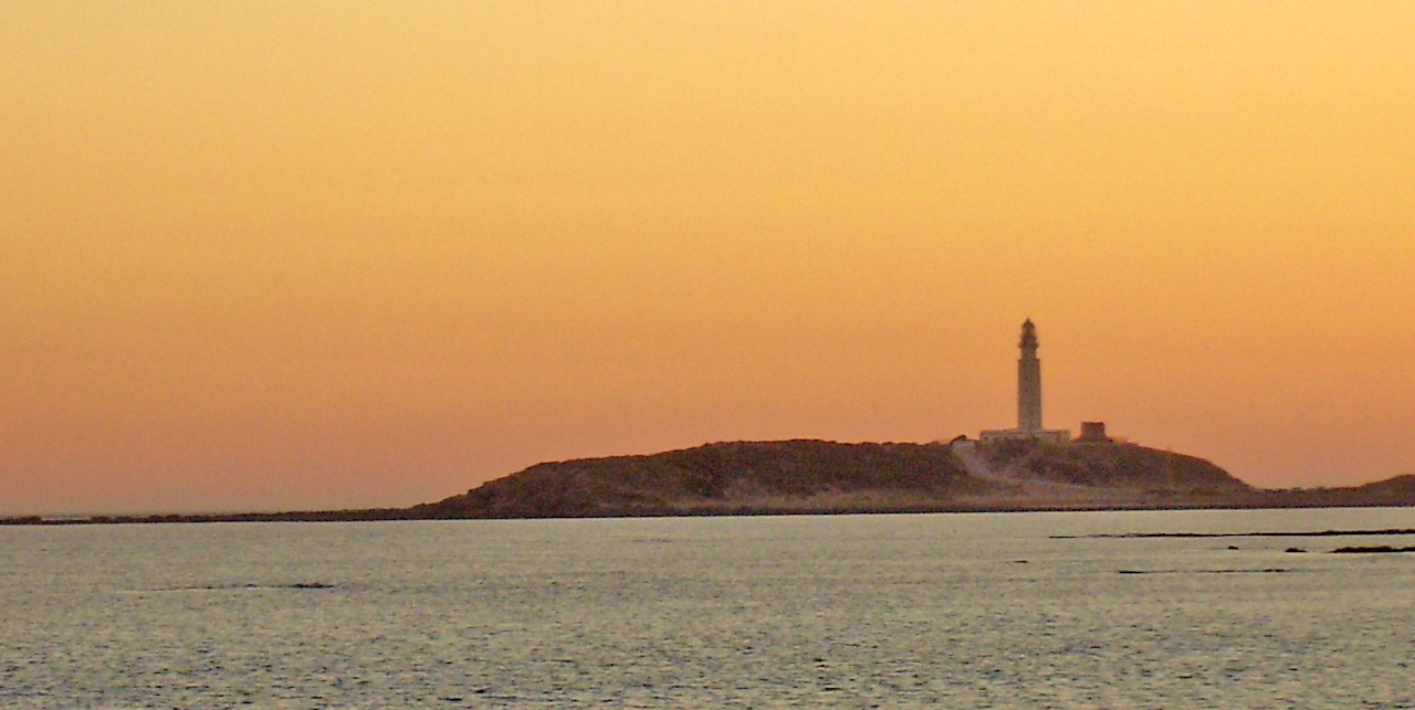 Sujet:Kap Trafalgar mam Liichttuerm Source:Eege Foto vum José María Sanchez Estévez, e User vun der spuenescher Wikipedia, deen den 22. Oktober 2005 zu Sevilla gestuerwen ass.